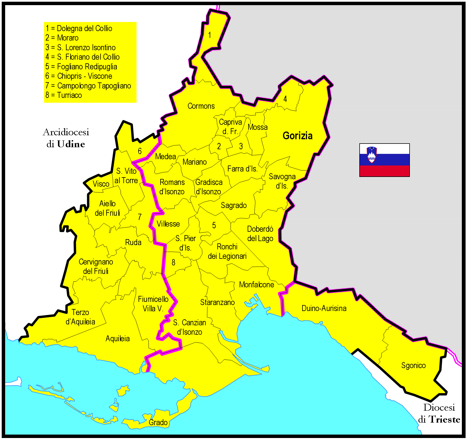 Mappa Diocesi di Gorizia